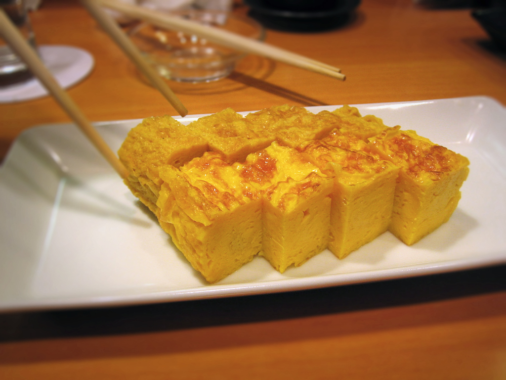 Japanese omelette河岸の玉子焼